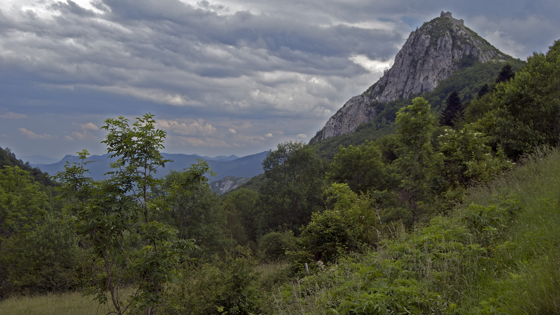 Vista desde el Oeste del Castillo de Monsegur